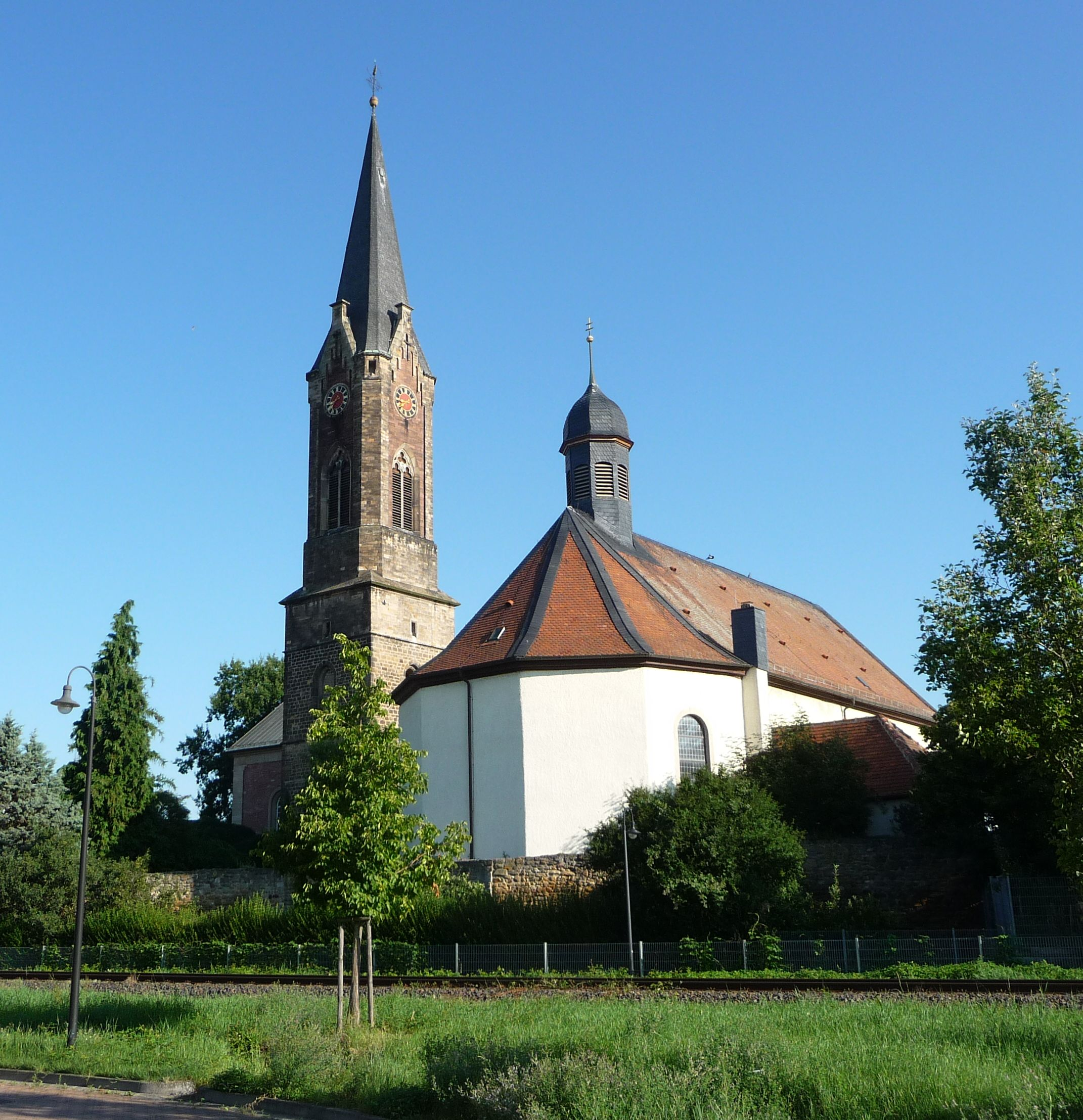 Lambsheimer Kirchen